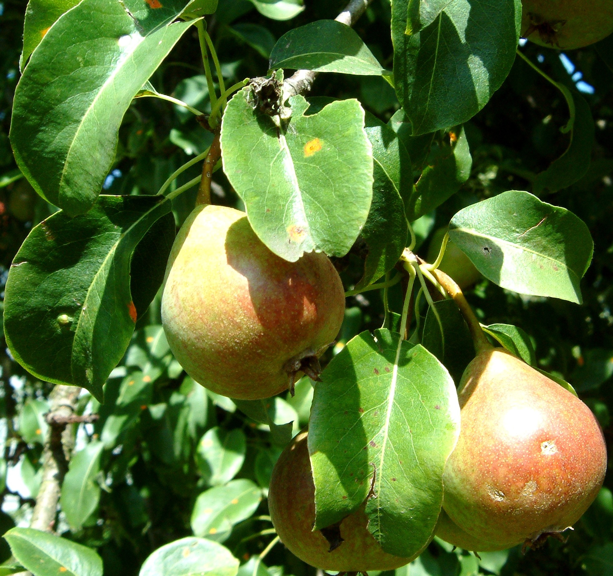 Maloideae_pear_Petersbirne_10_Juli_2003